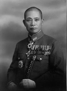 河野悦次郎。昭和十五年八月二十二日摄于济南。